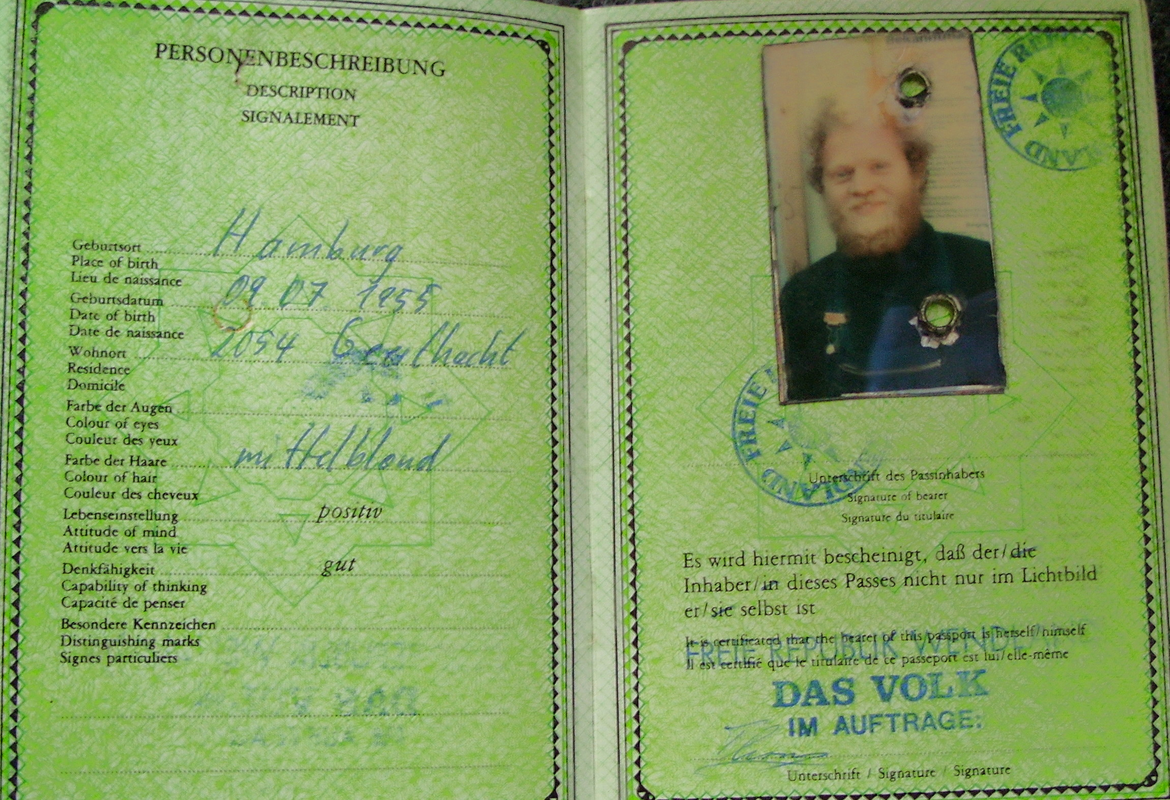 Ausweis der Republik Wendland, 1980